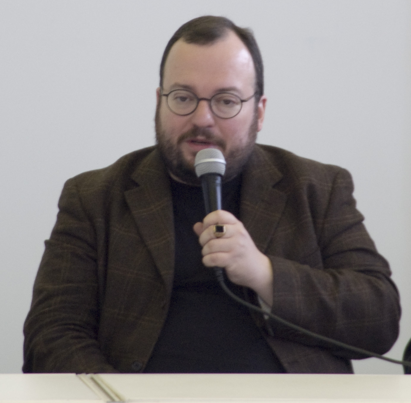 Станислав Белковский